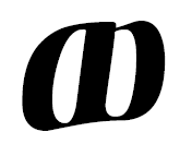 ваве амхар